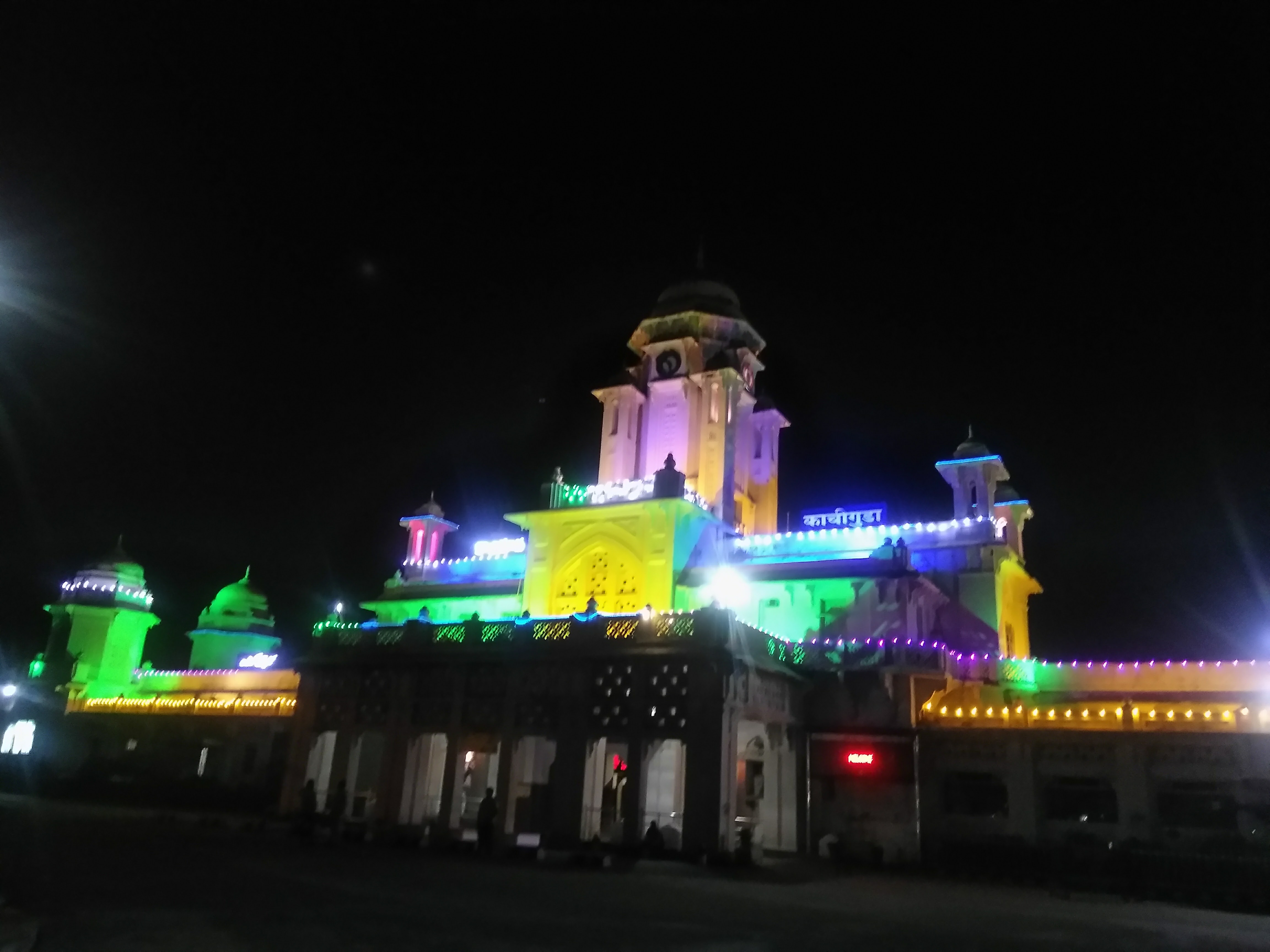 కాచిగూడ రైల్వేస్టేషన్